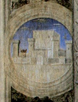 Sigismondo Pandolfo Malatesta before Saint Sigismund Piero della Francesca Fresco, 257 x 345 cm Rimini, Tempio Malatestiano